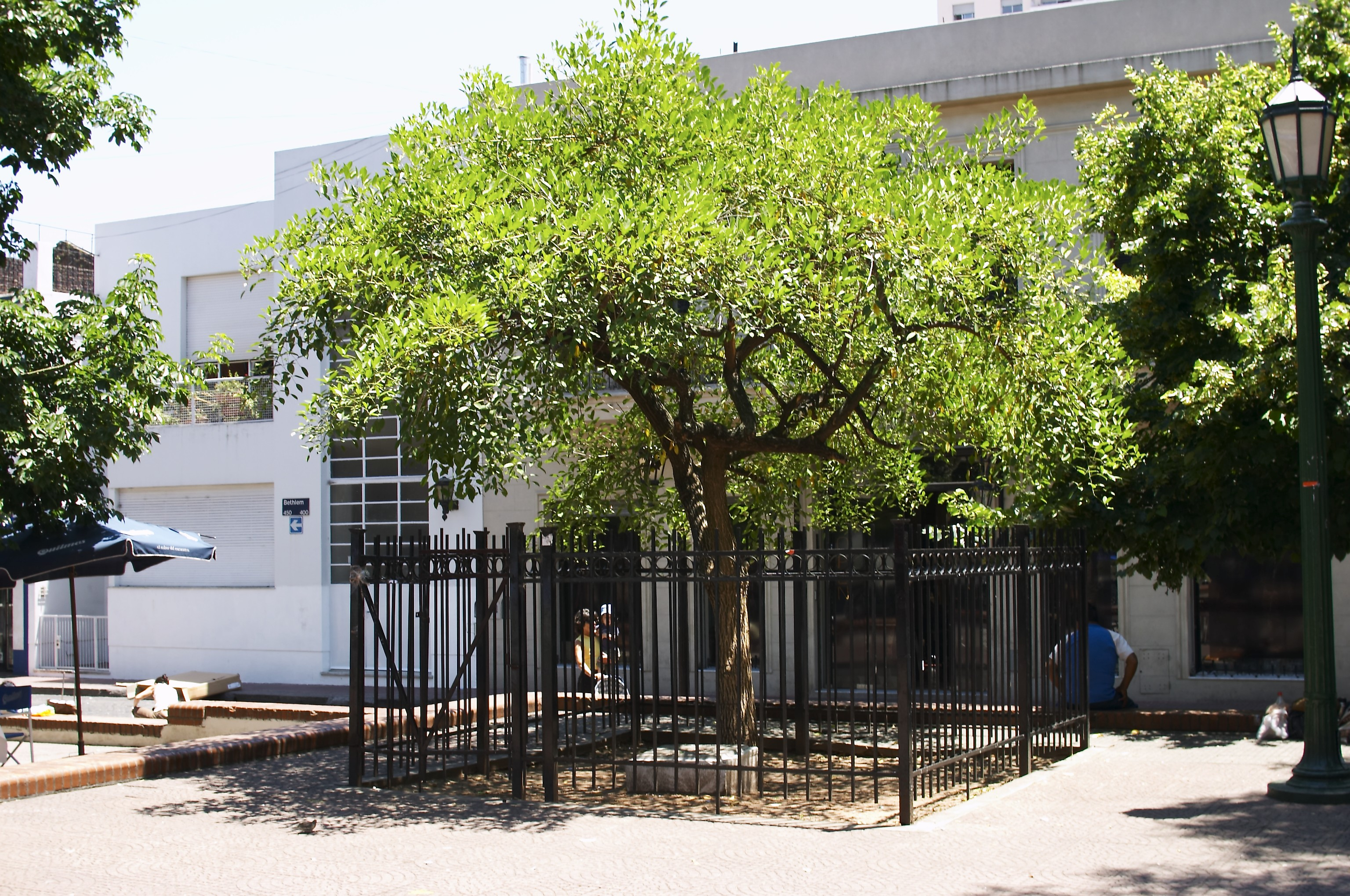 Plaza Dorrego, Buenos Aires, Argentina. Árbol y placa colocada en el 2003 por el Gobierno de la Ciudad de Buenos Aires, recordando la desaparición el 8 de julio de 1976, de Adelina Noemí Gargiulo, artesana de la plaza, víctima de la dictadura argentina de aquel entonces. Barrio de San Telmo.